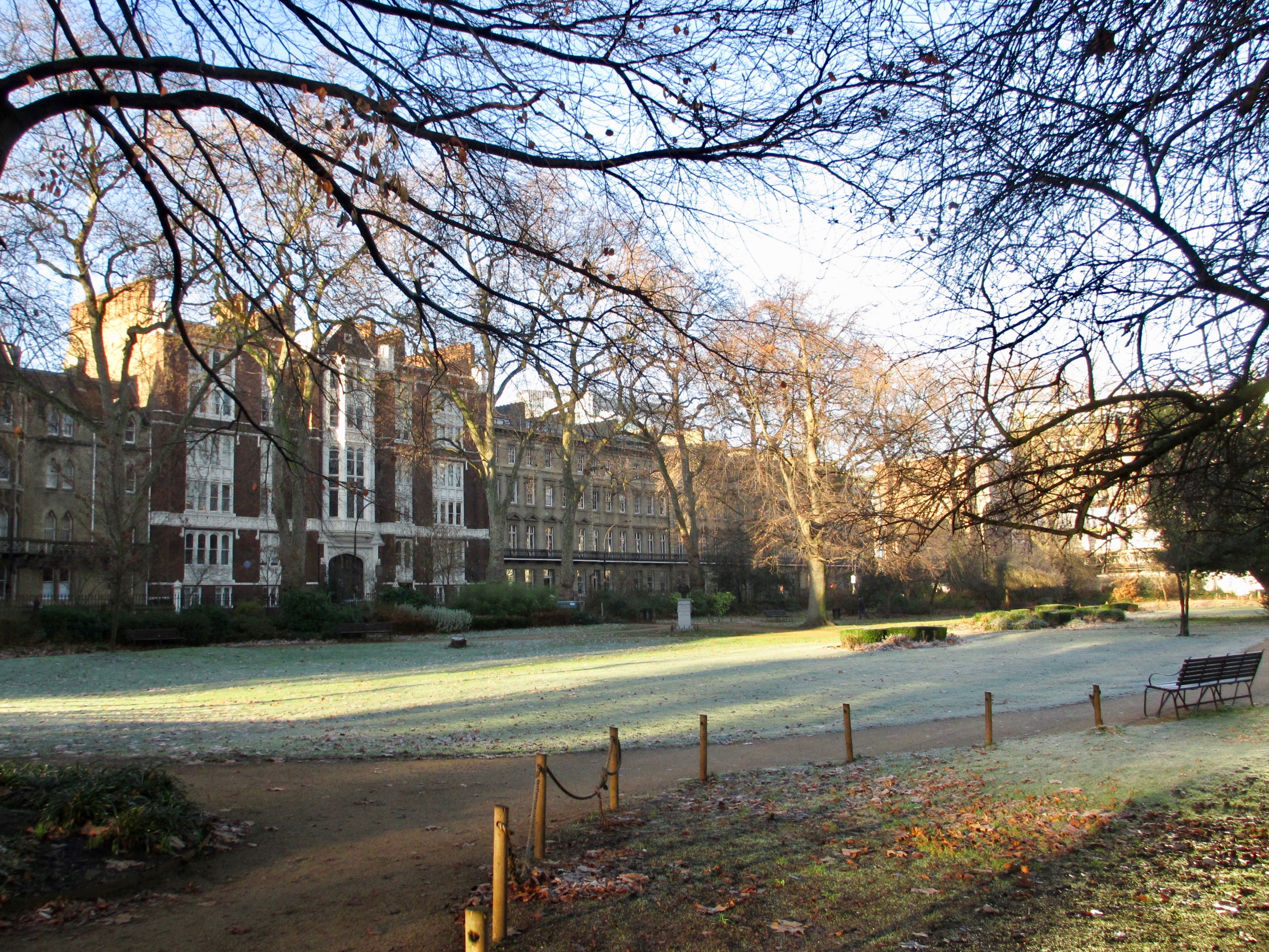 Gordon Square Gardens London